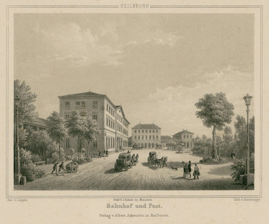 Heilbronn, Bahnhof und Post. Lithographie, 13,4 × 18,4 cm. Gezeichnet von Johannes Läpple, lithographiert von Eberhard Emminger. Verlag von Albert Scheurlen, Heilbronn